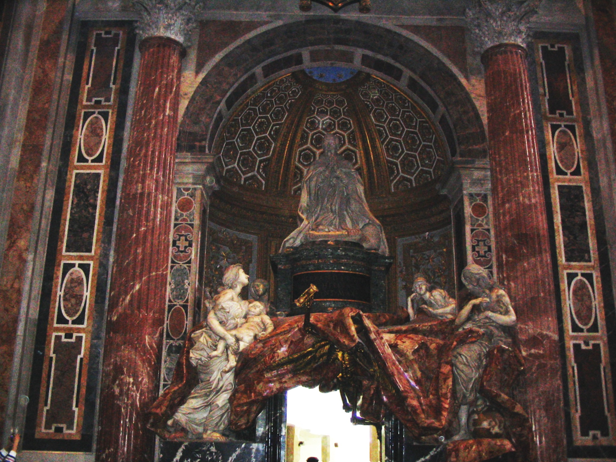 Monumento en memoria a papa Alejandro VII, Basílica de San Pedro